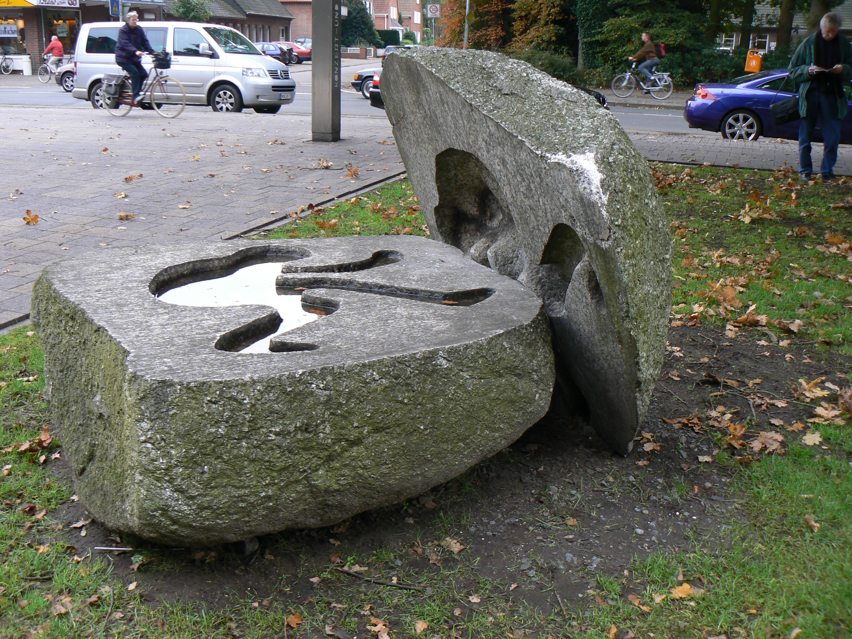 sculpture Der Findling (1978-80) by Timm Ulrichs in Nordhorn/Germany